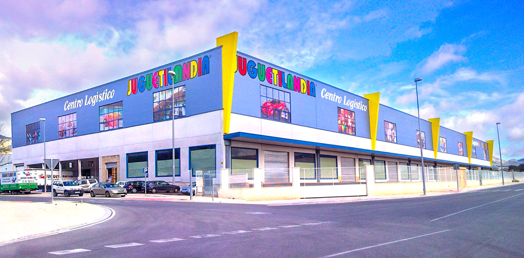 Onil centro logístico